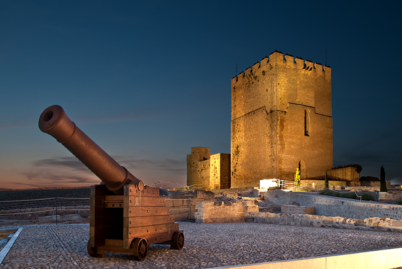 Alcazaba de la Fortaleza de la Mota, Alcalá la Real.